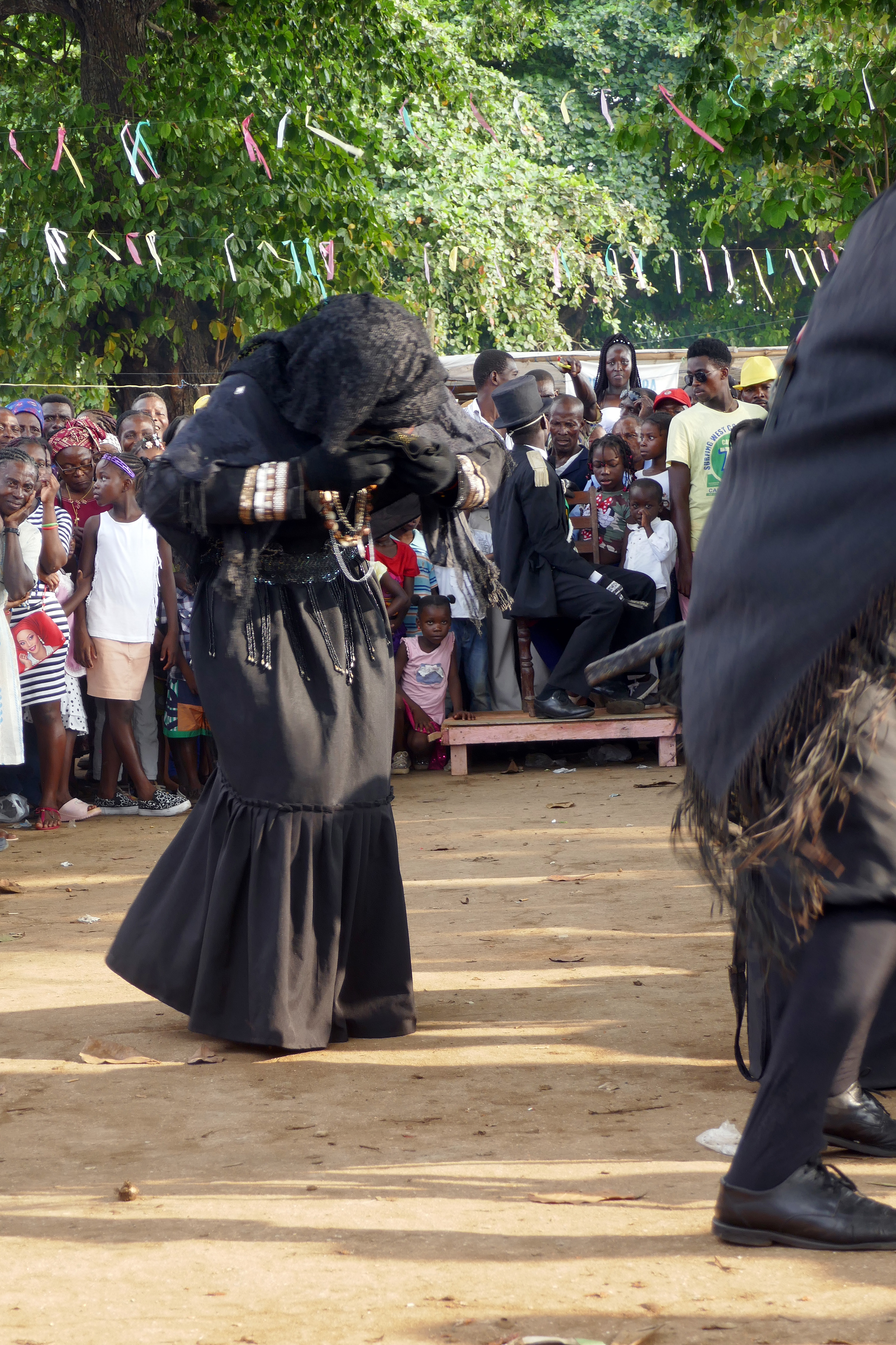 Tchiloli représenté devant l'église São Pedrão de São Tomé à l'occasion de la fête patronale. Le tchiloli est une forme théâtrale, musicale et dansée créée au XVIe siècle, jouée par des pêcheurs et des paysans. Traditionnellement elle met en scène la seule pièce du répertoire, La tragédie du marquis de Mantoue et de l'empereur Charlemagne". This is an image with the theme "Play" from: Sao Tome and Principe